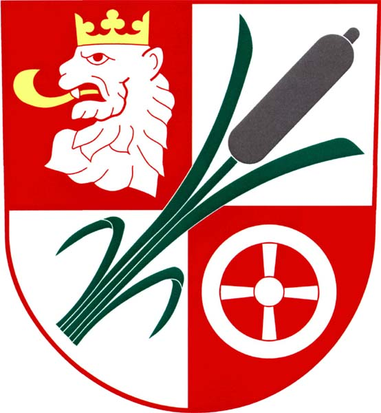 Znak obce Střítež (okres Jihlava)